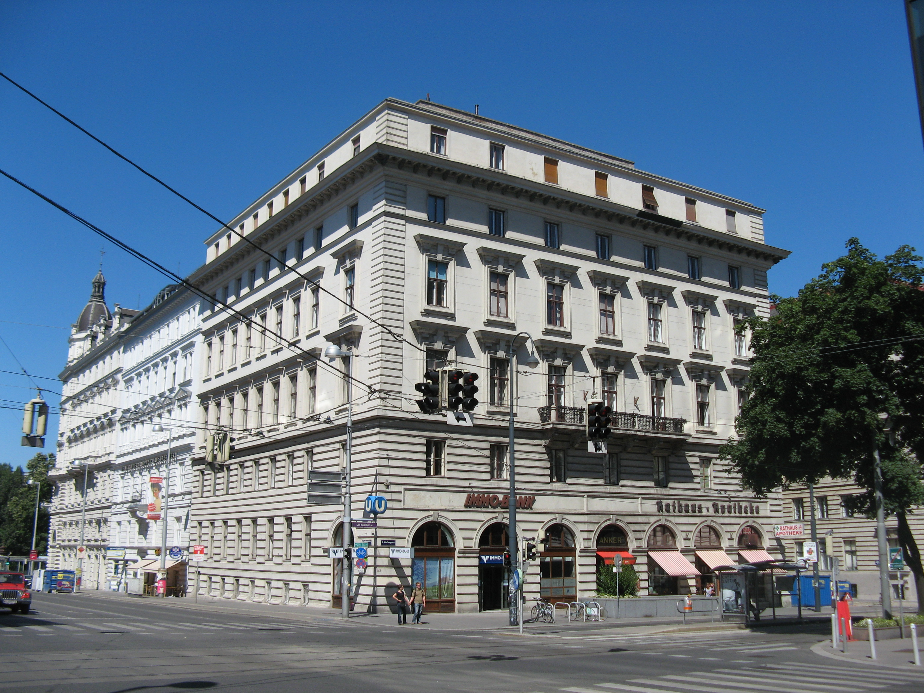 Haus (1880) von Otto Wagner, Stadiongasse 10, Wien-Innere Stadt